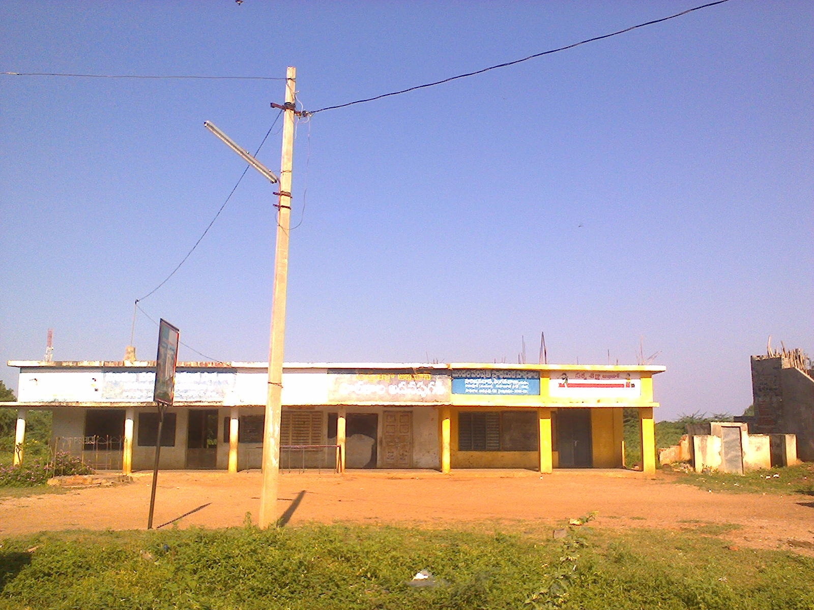 లింగనవాయి ప్రాథమిక పాఠశాల